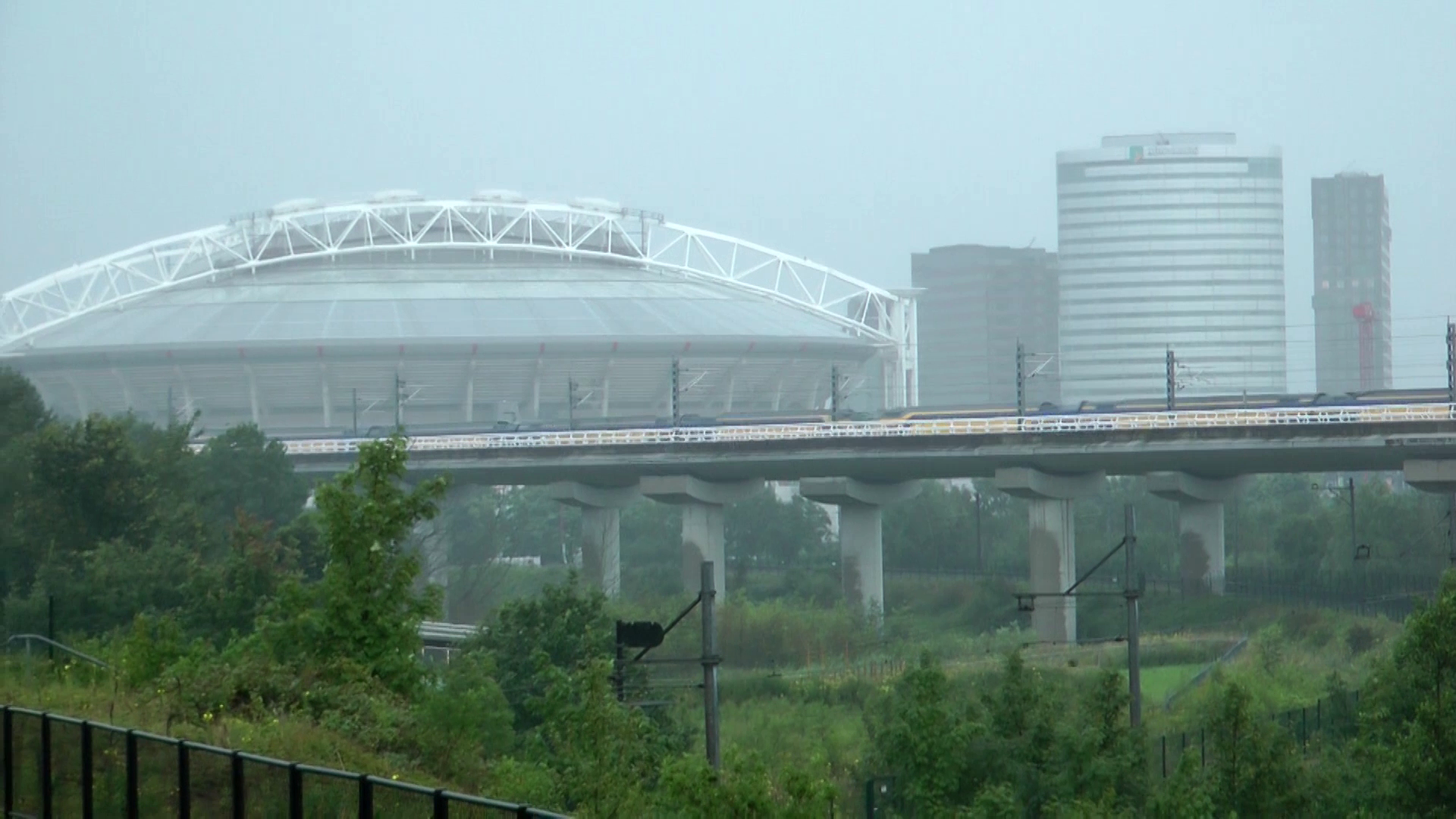 De Amsterdam Arena met op de voorgrond de treinverbinding tussen Schiphol en Utrecht.